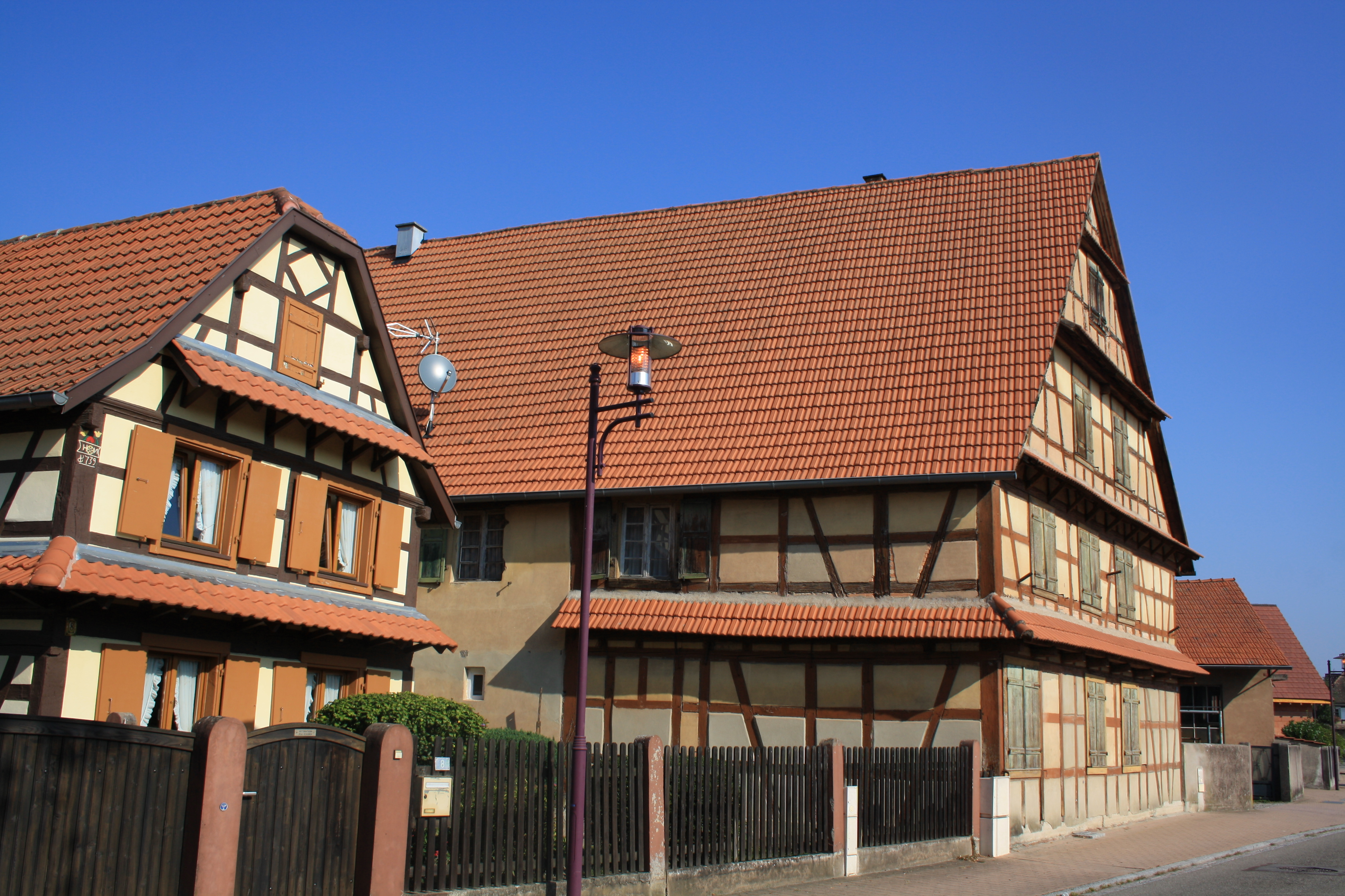 Offendorf, Elsass